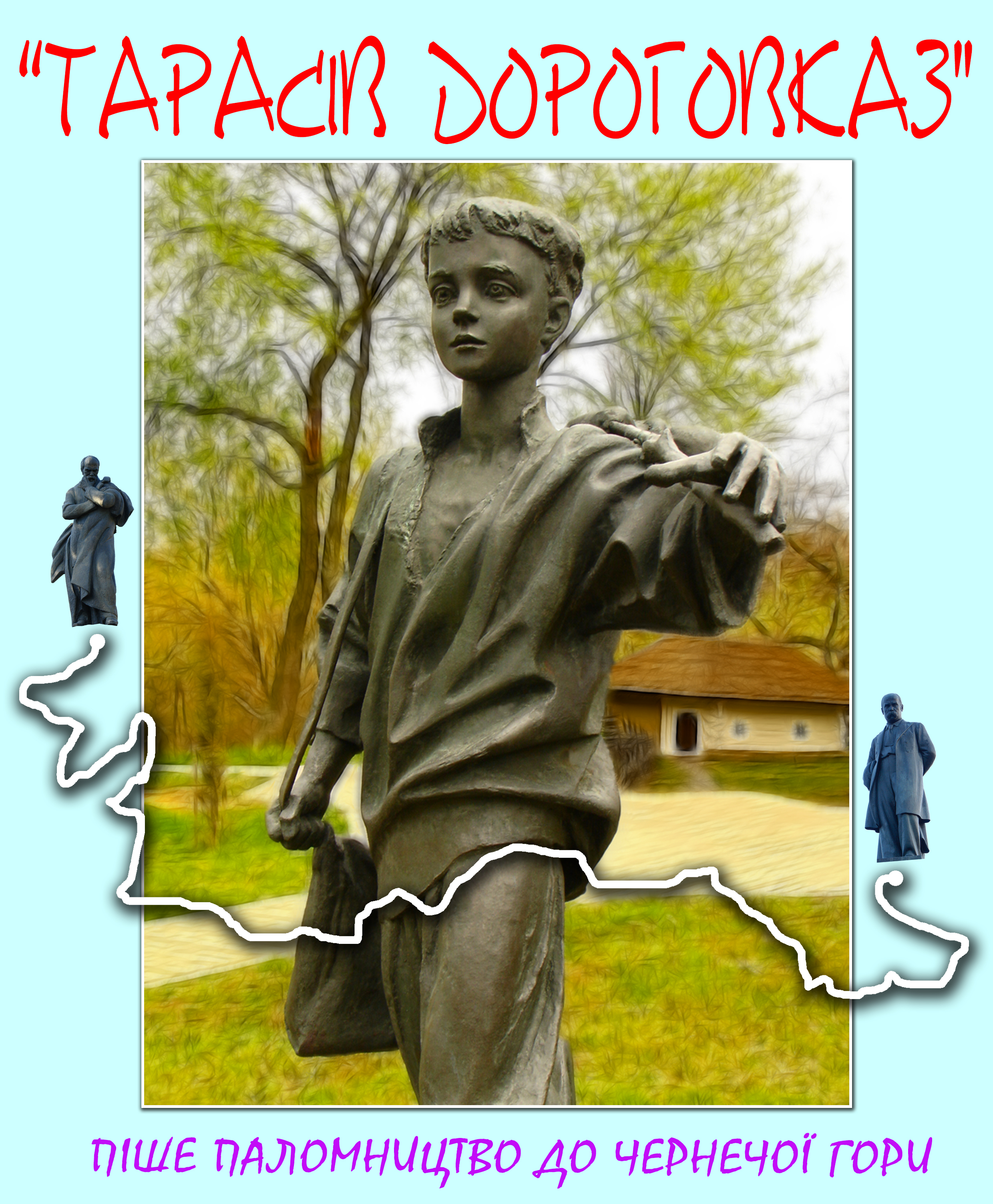 Афіша "Тарасового Дороговказу" у 2008 році.